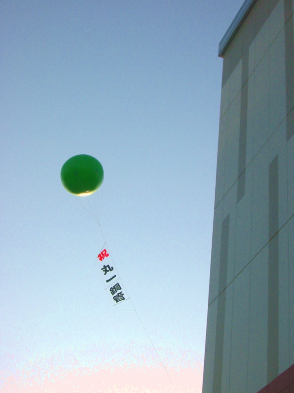 ポートアイランドにてアドバルーン